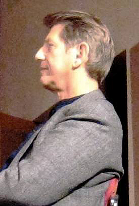 L'attore statunitense Peter Coyote